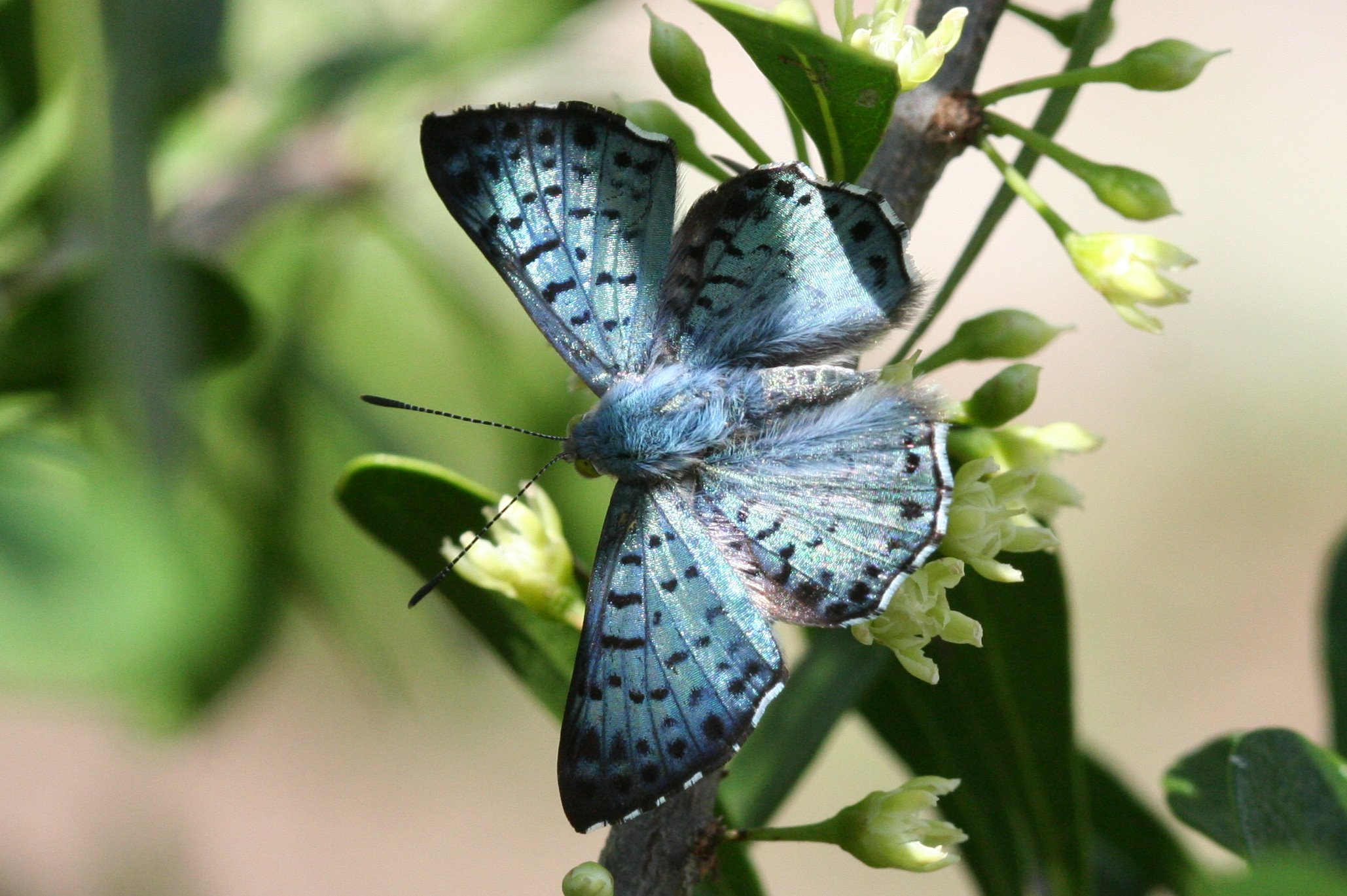 Lasaia sula (best viewed large)